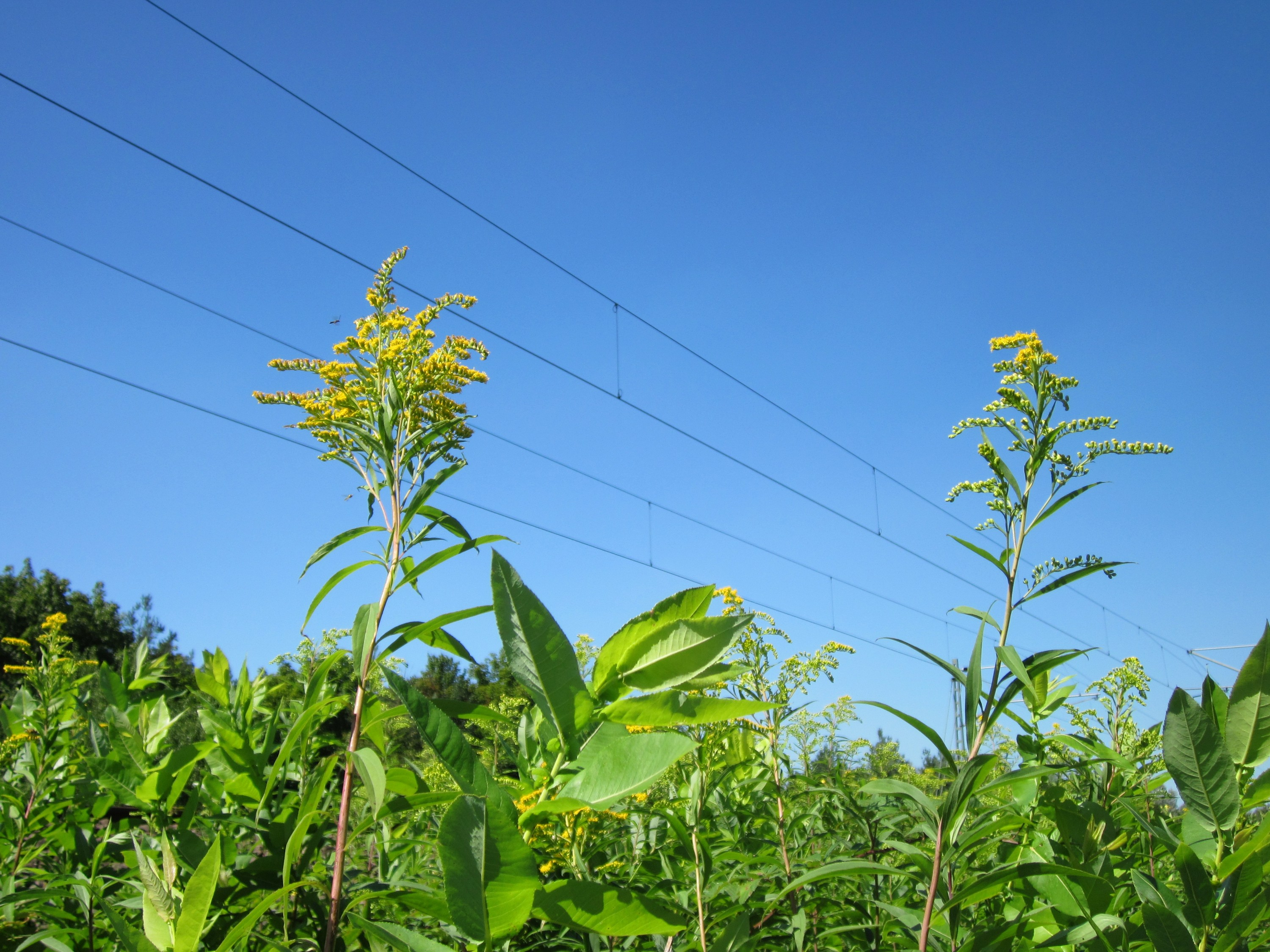 Kanadische Goldrute (Solidago canadensis) im Schwetzinger Hardt - typische Bahndammvegetation